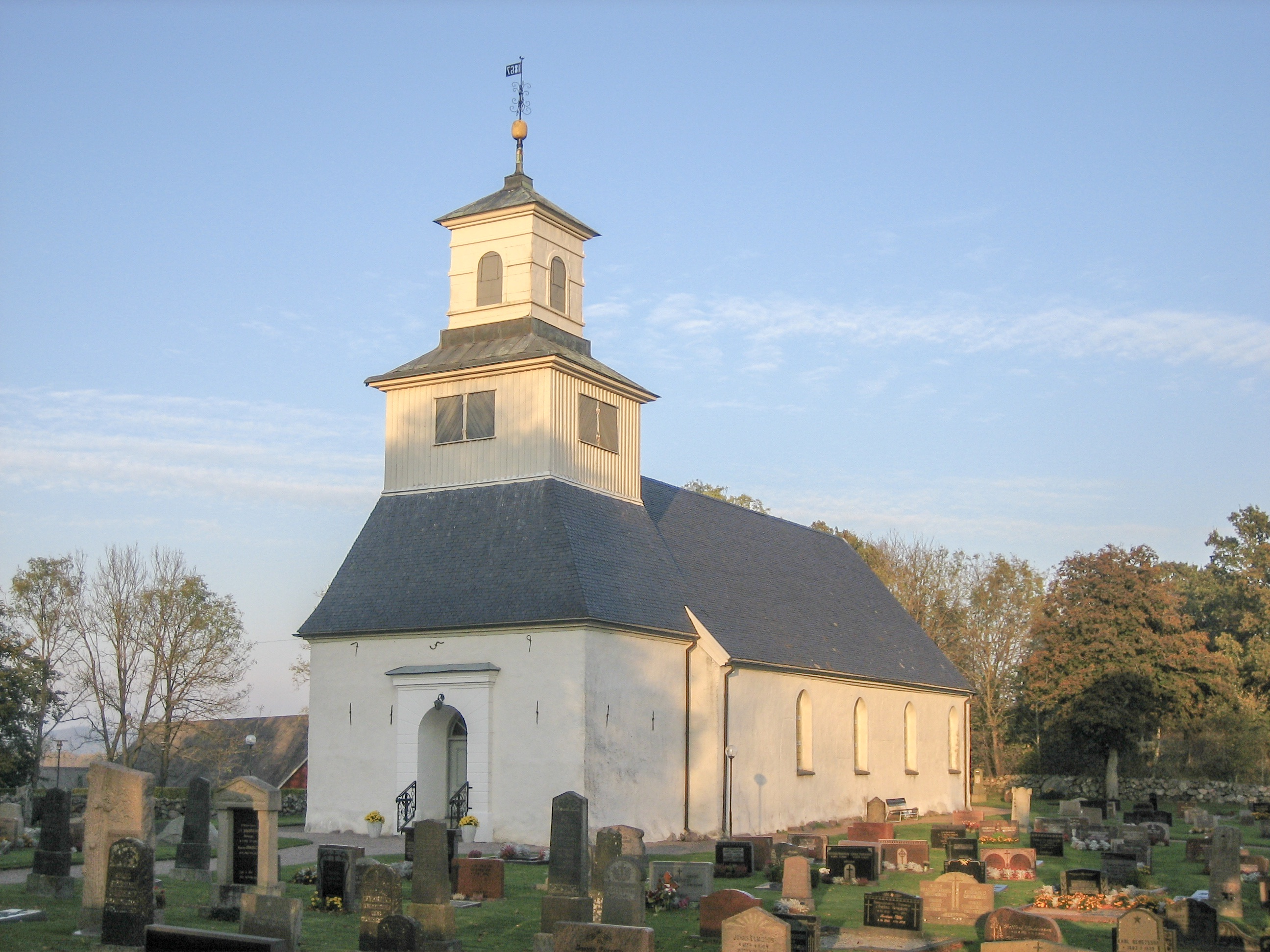 Rävinge kyrka